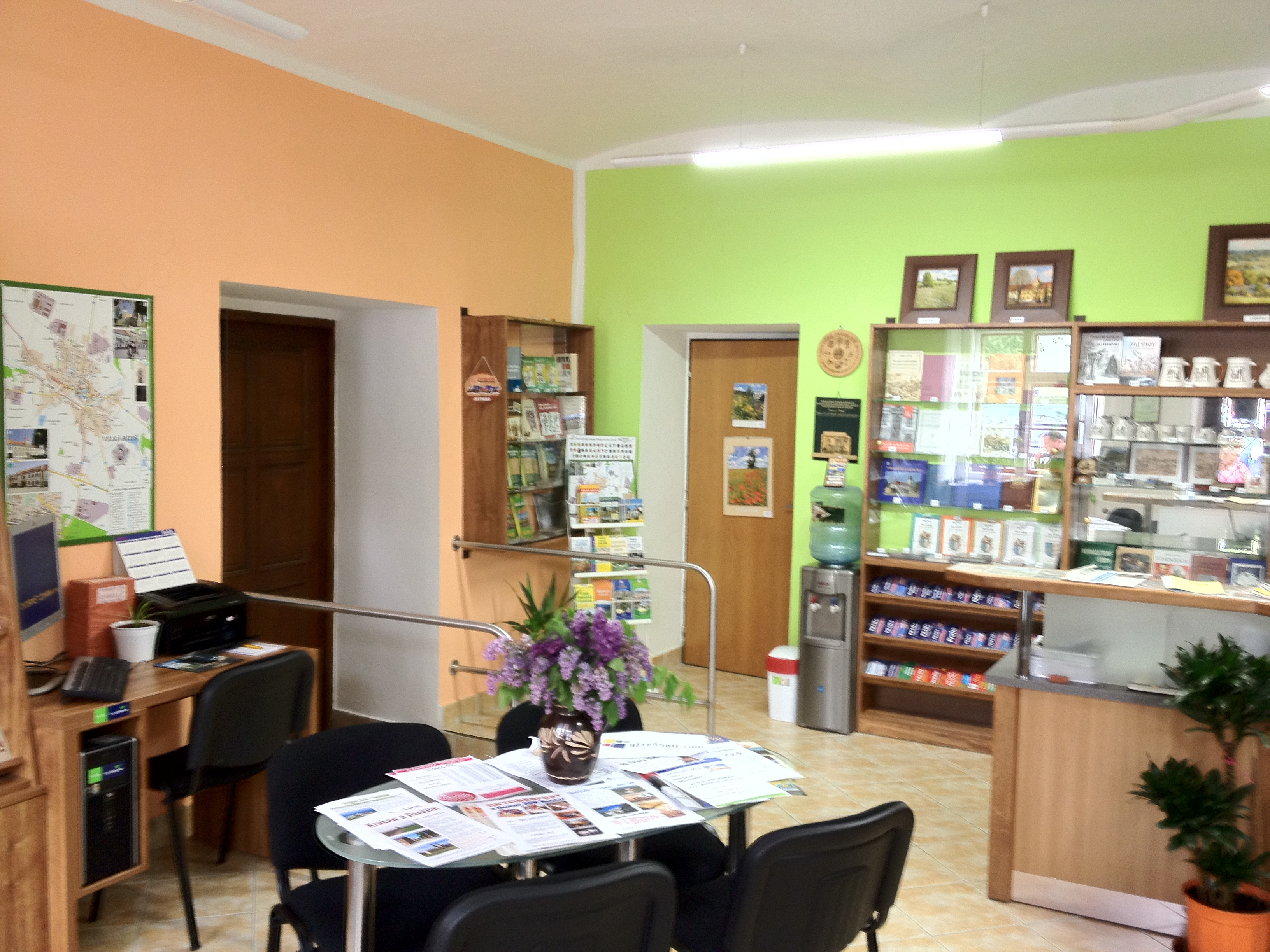 TIC interiér